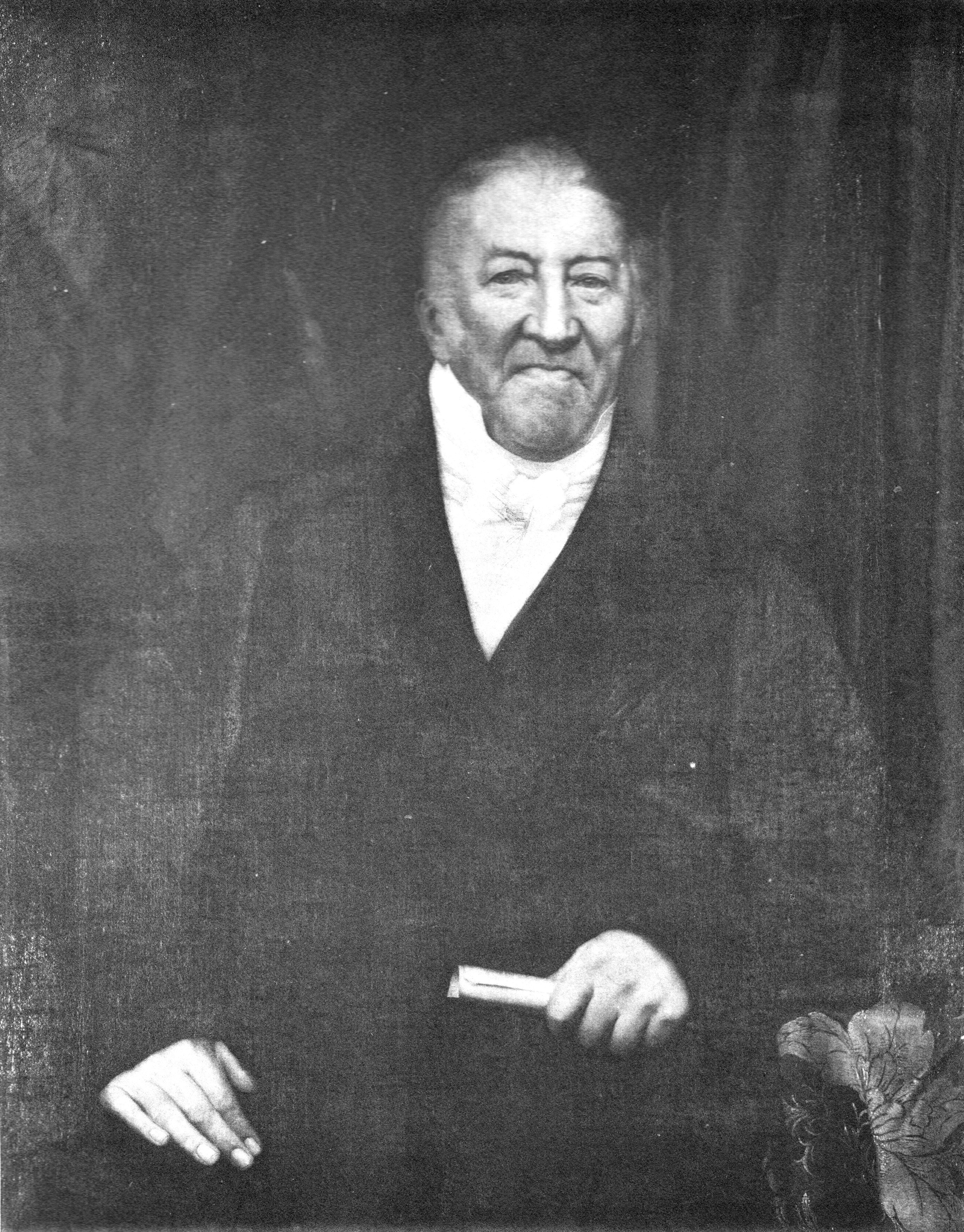 Johann Friedrich Hach (1769-1851), Senator der Hansestadt Lübeck, Oberappellationsgerichtsrat